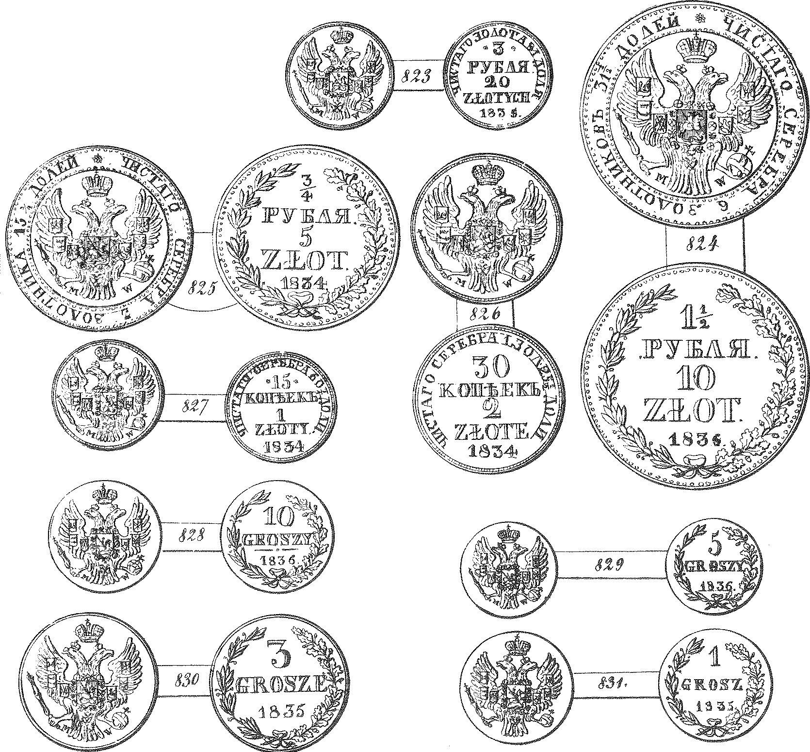 Monety polskie Królestwa Polskiego od roku 1834